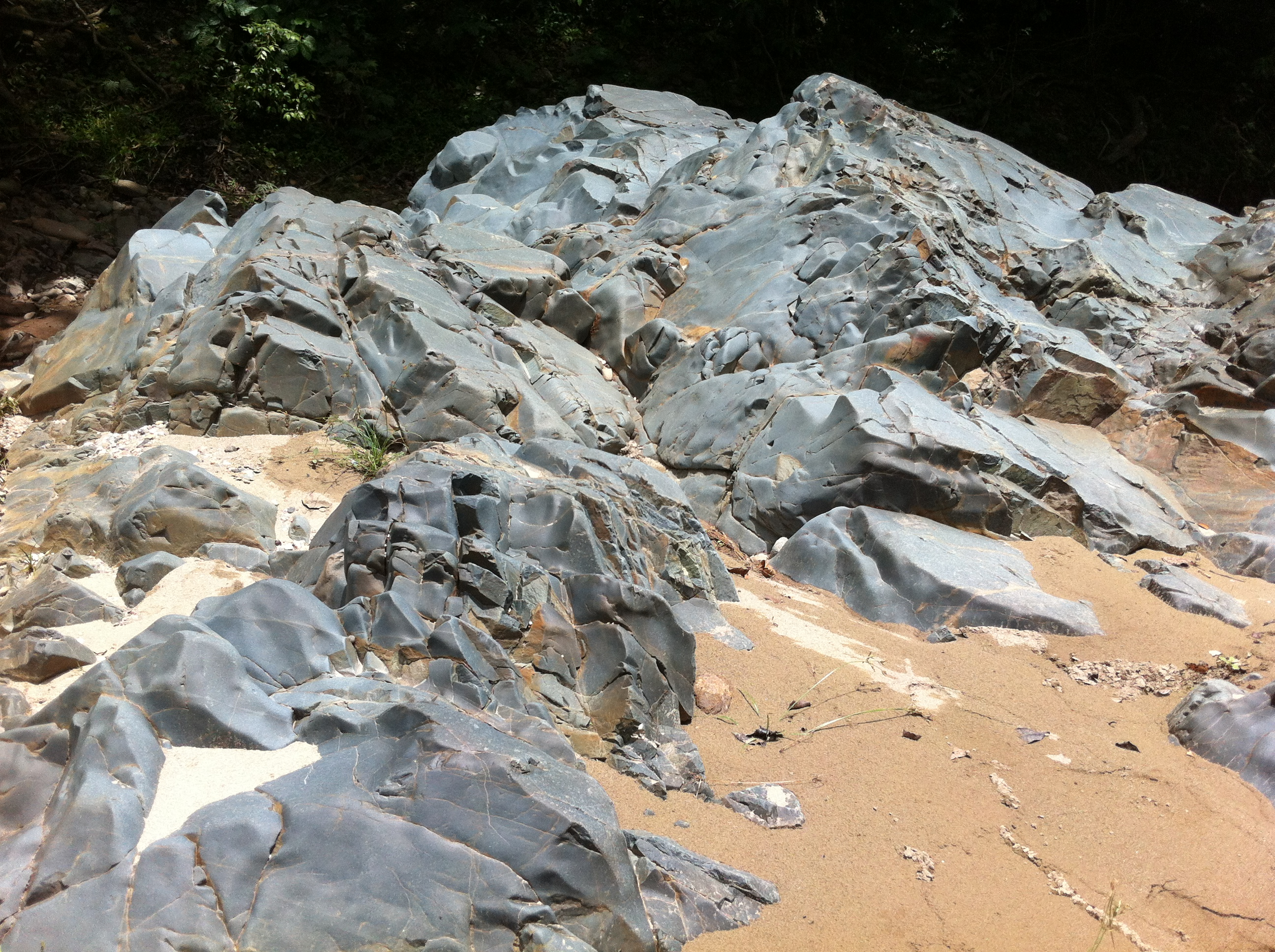 Quebrada